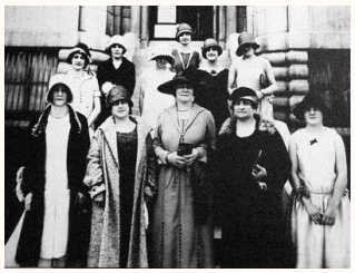 Idola Saint-Jean et des suffragettes lors de la création en 1922 du Comité provincial pour le suffrage féminin.